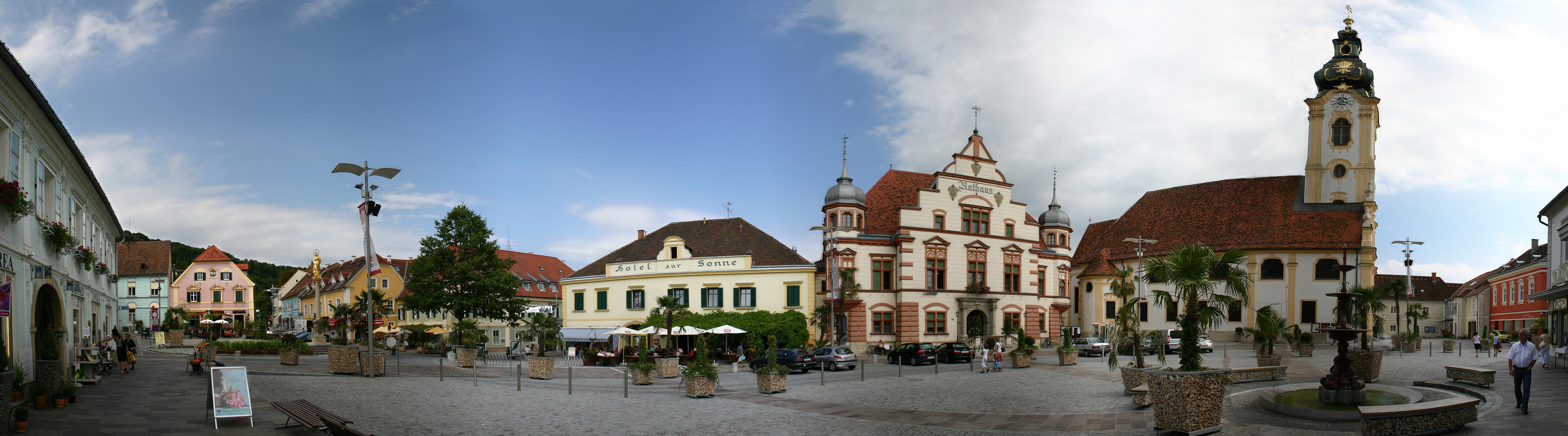 Hartberg Hauptplatz 180°-Panoramabild (zusammengesetzt mit „autostitch“ aus 8 Einzelbildern)